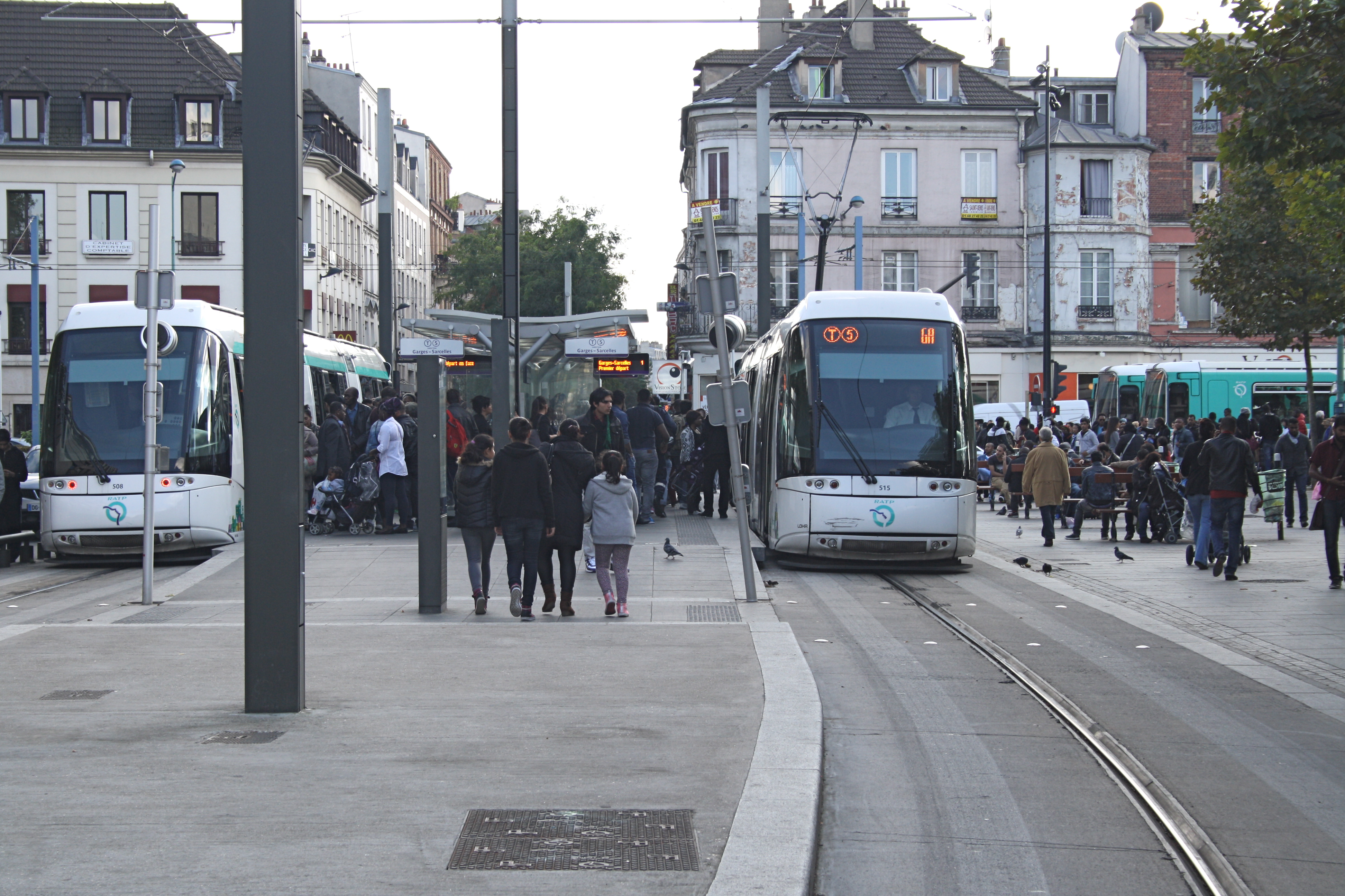 Translohr au terminus Marché de Saint-Denis